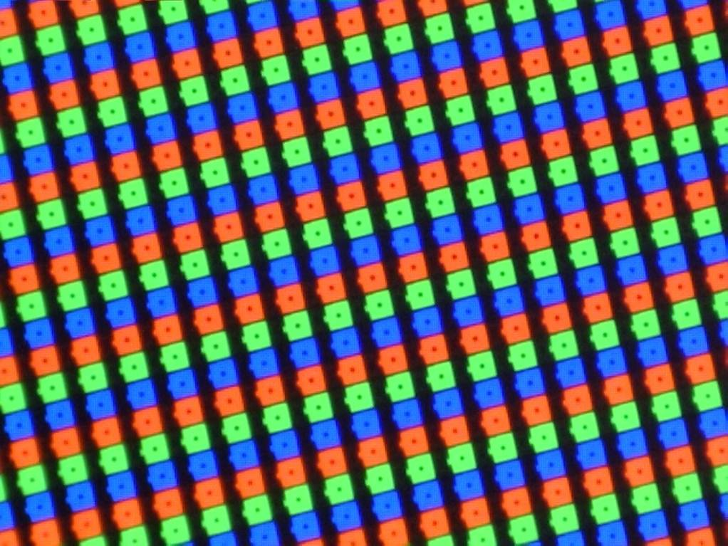 Αυτοστερεο κλιστο